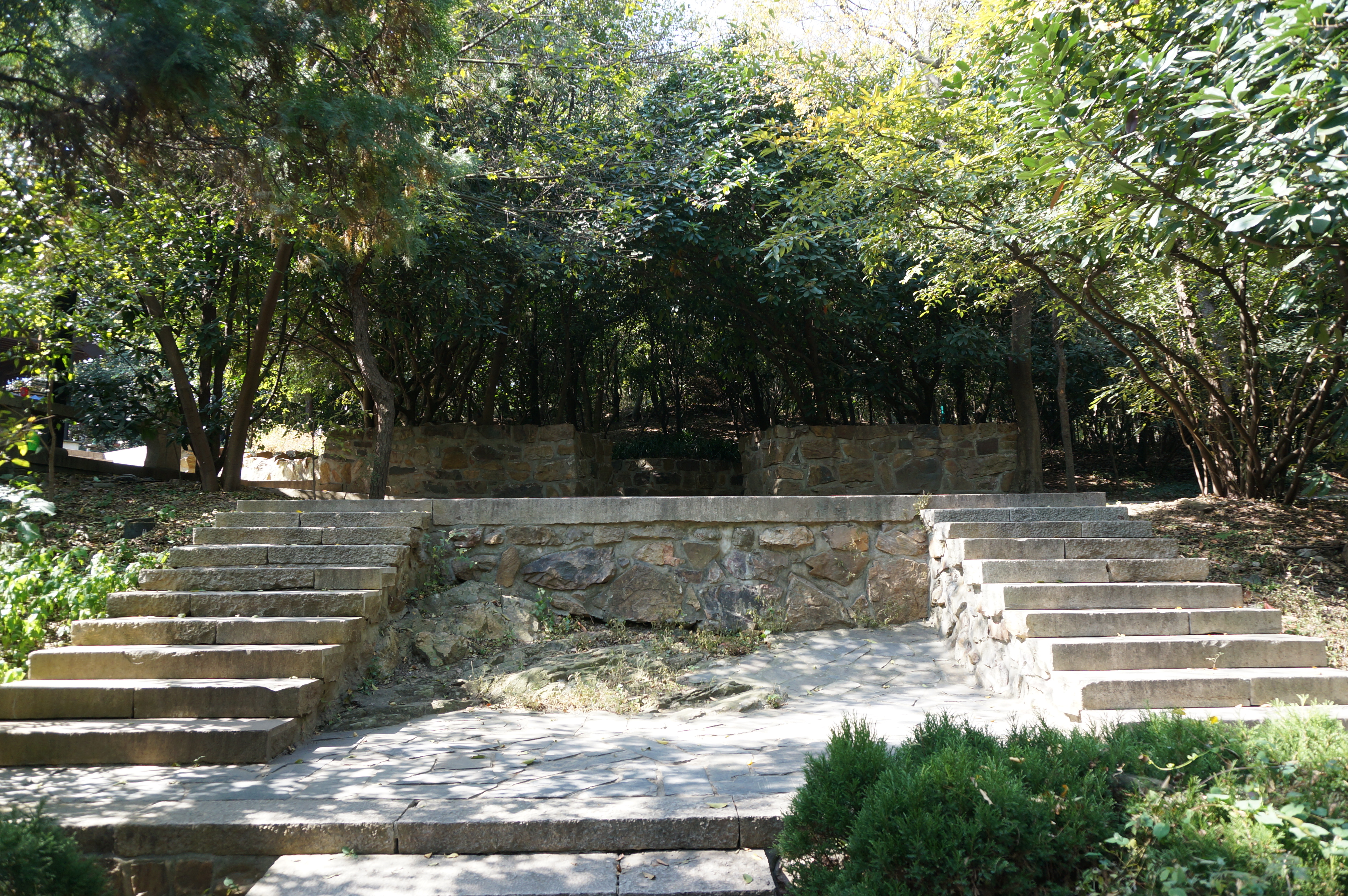 周章墓，墓冢。